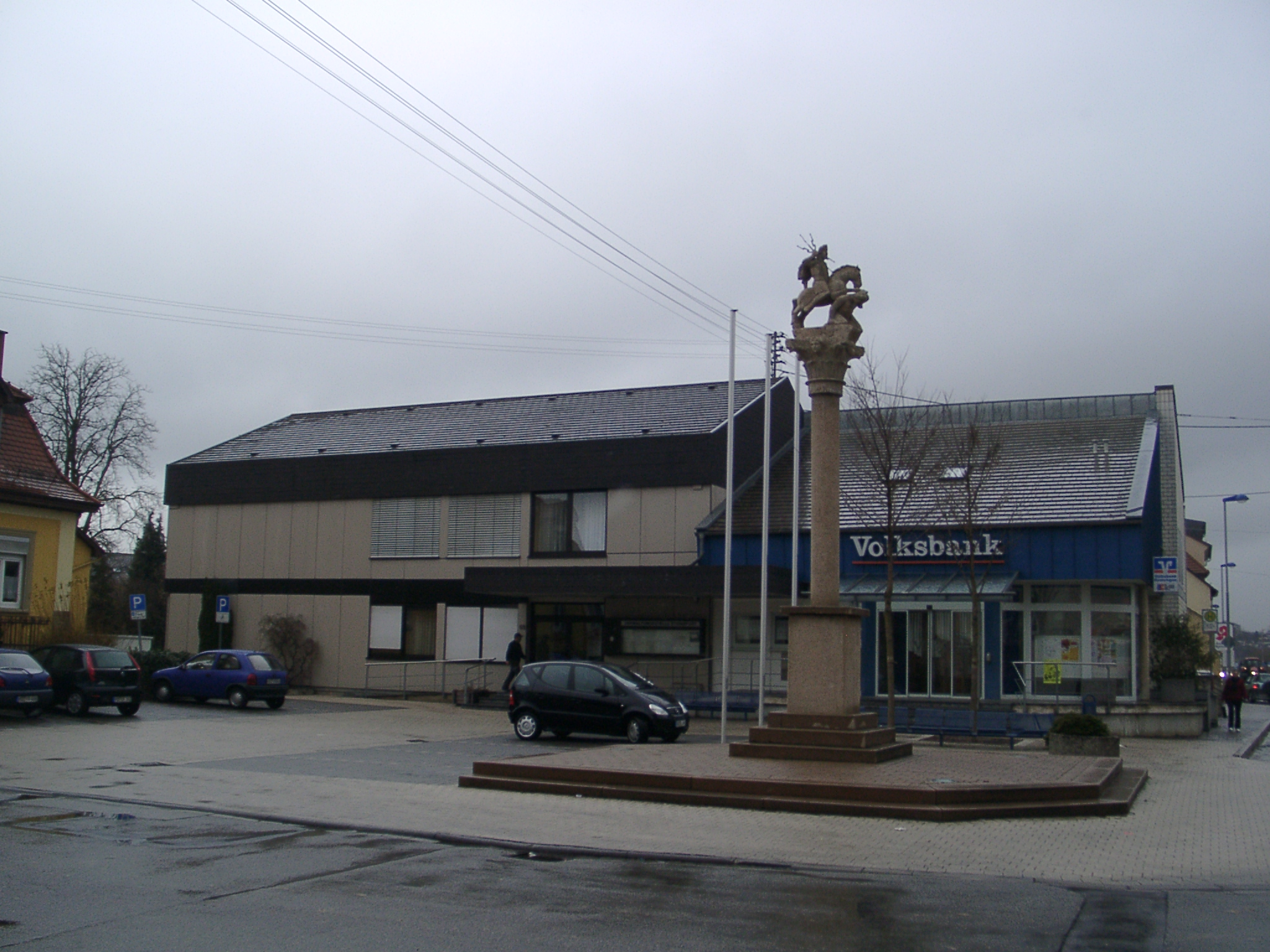 Ortsmitte von Sinsheim-Steinsfurt mit Nachbildung der Jupitergigantensäule Fotograf: Klaus Graf